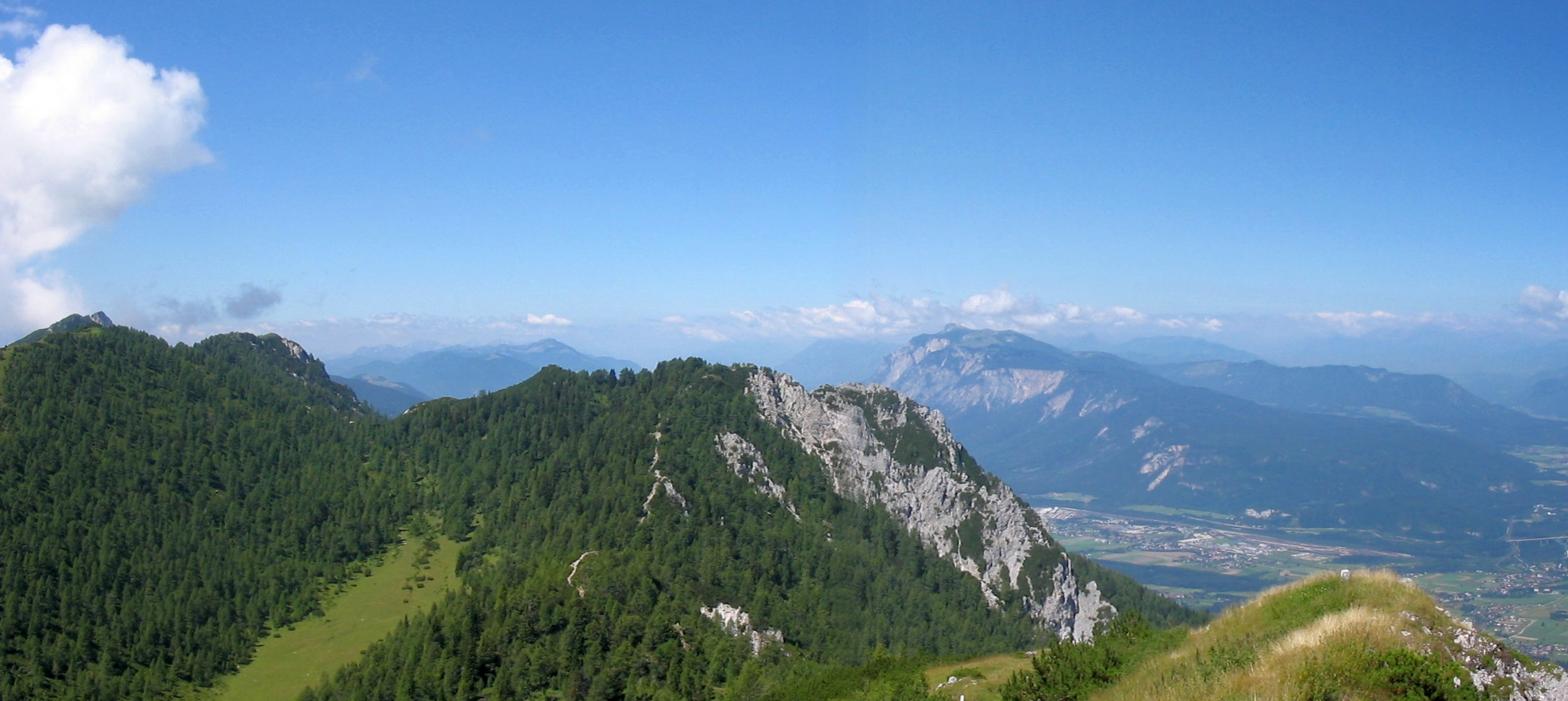 Panorama vom Schwarzkogel in den Karawanken, Blickrichtung nach Westen, in Bildmitte der Mallestiger Mittagskogel